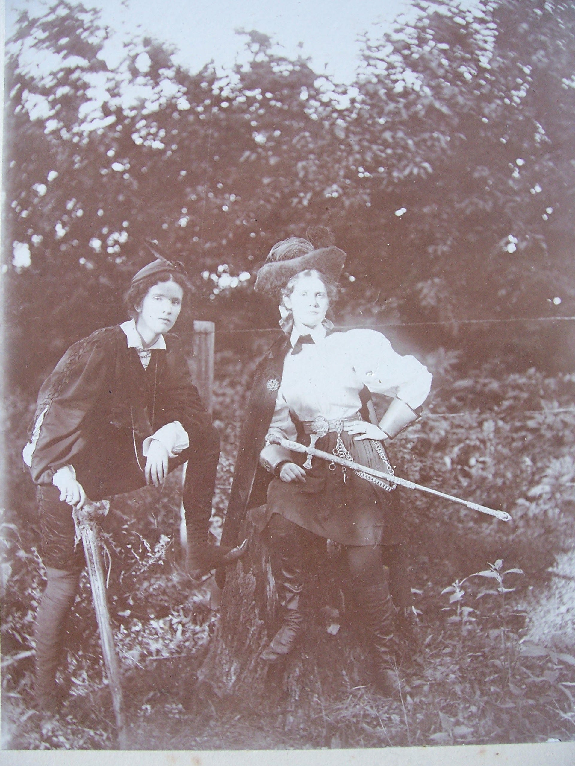 deux comédiennes d'Une heure au chateau d'Etupes